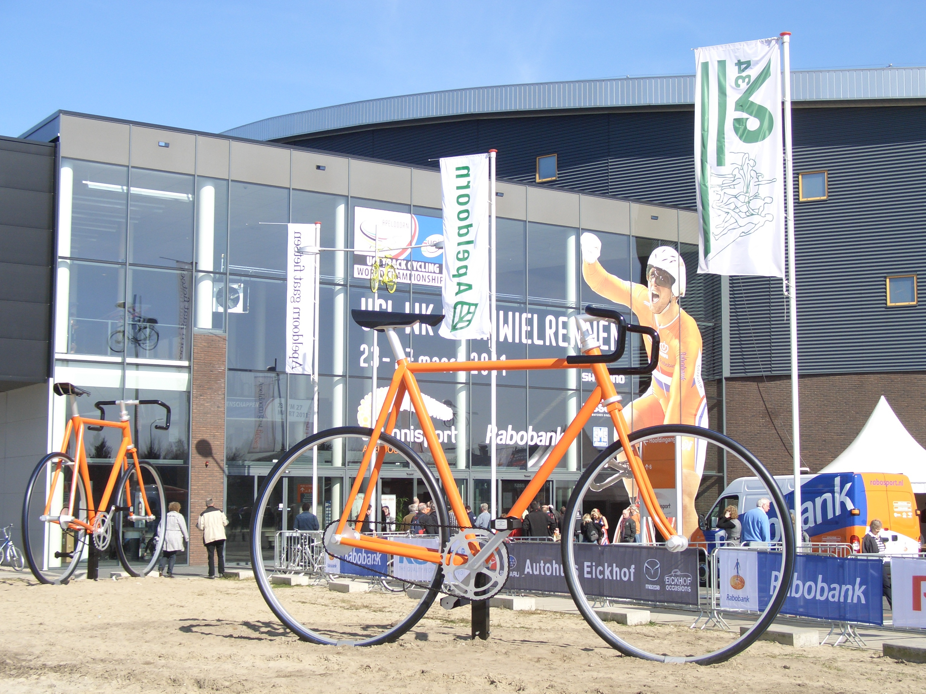 Omnisport-Halle in Apeldoorn, Bahnrad-WM 2011